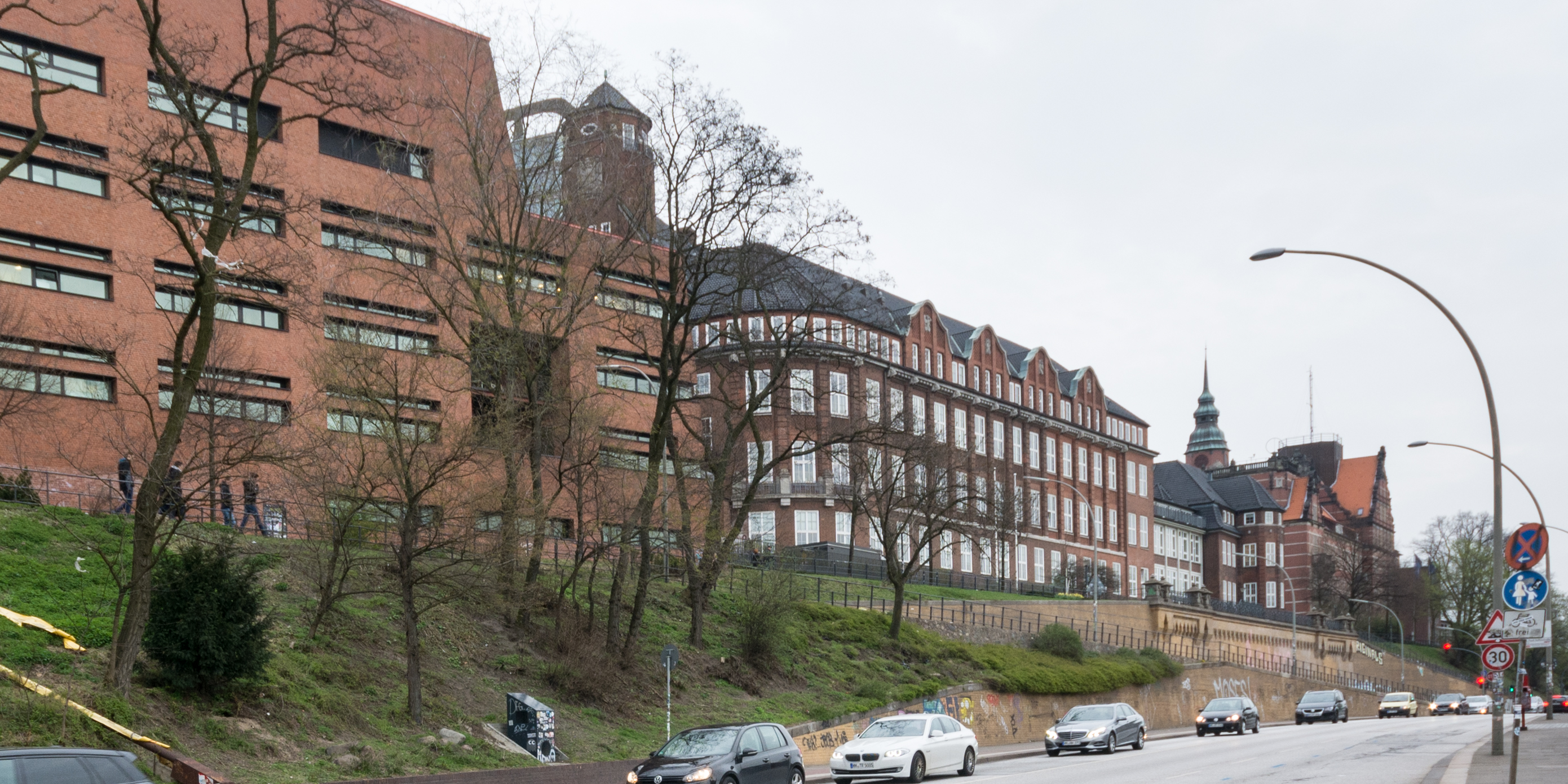 Bernhard-Nocht-Institut für Tropenmedizin in Hamburg-St. Pauli. Im Vordergrund der Laborneubau, im Hintergrund der Altbau. This is a photograph of an architectural monument.